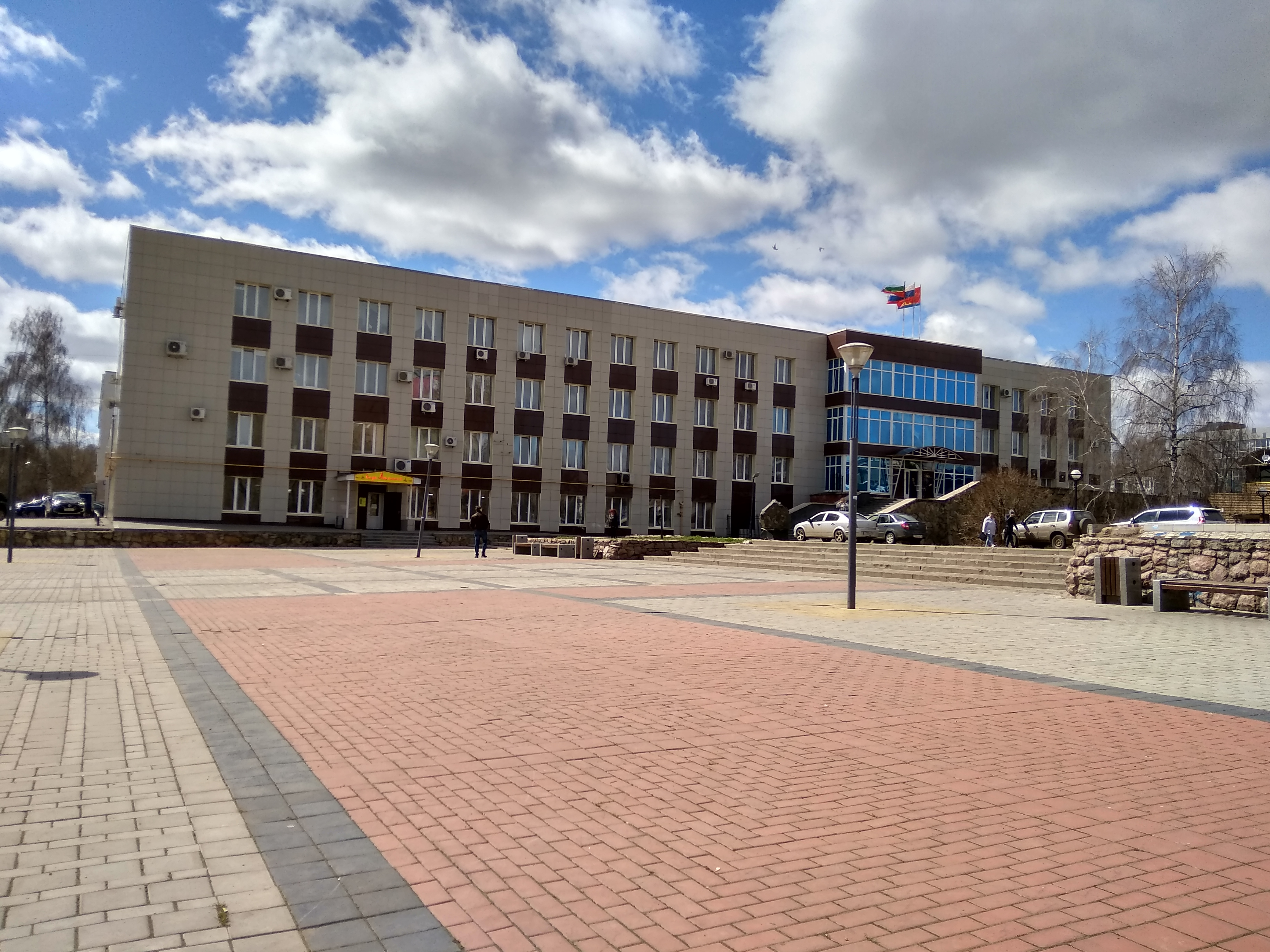 Здание Администрация Тукаевского района Республики Татарстан, расположенное в городе Набережные Челны.